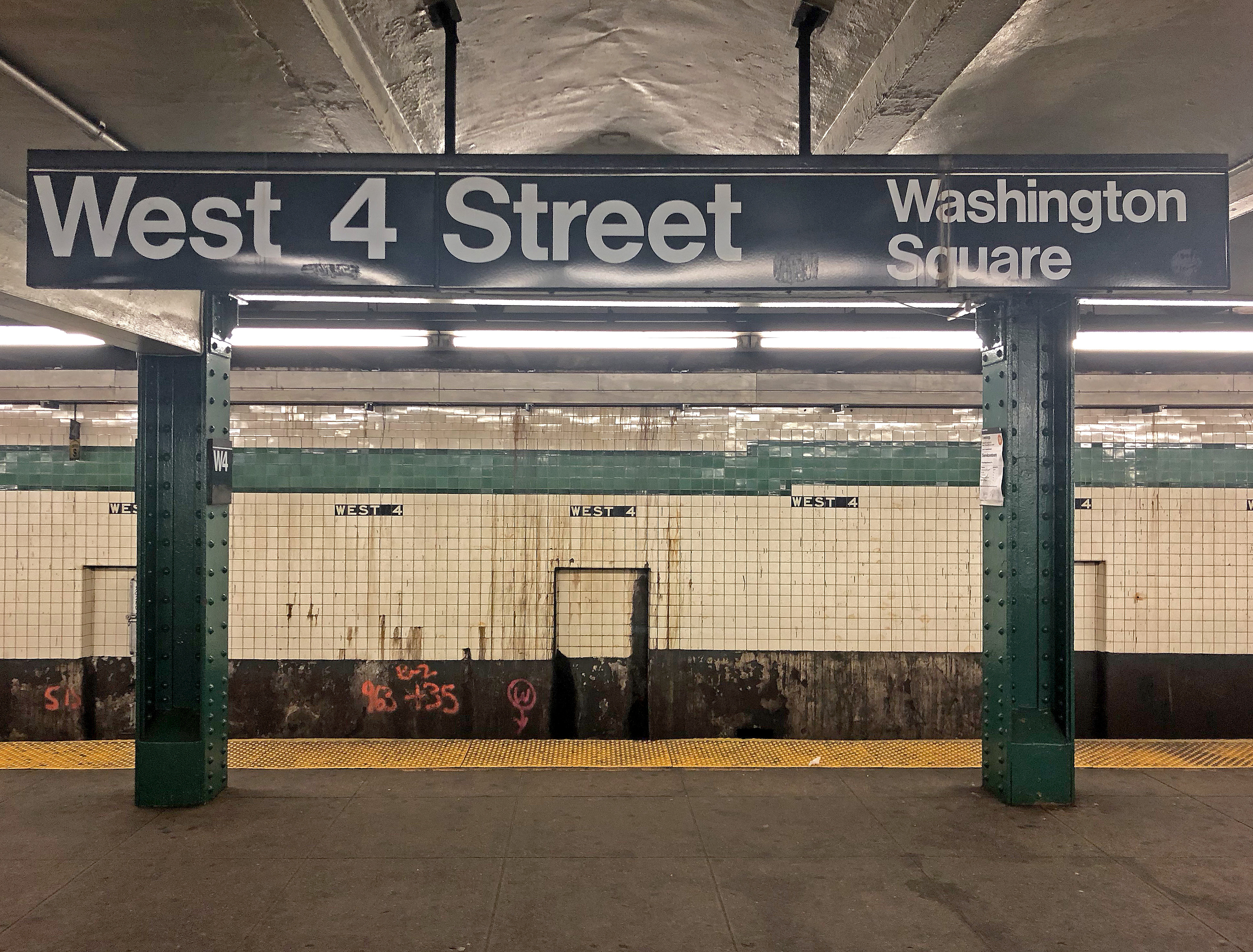 West 4 Street NYC Subway station showing current (2018) status with regard to degree of cleanliness and modernity